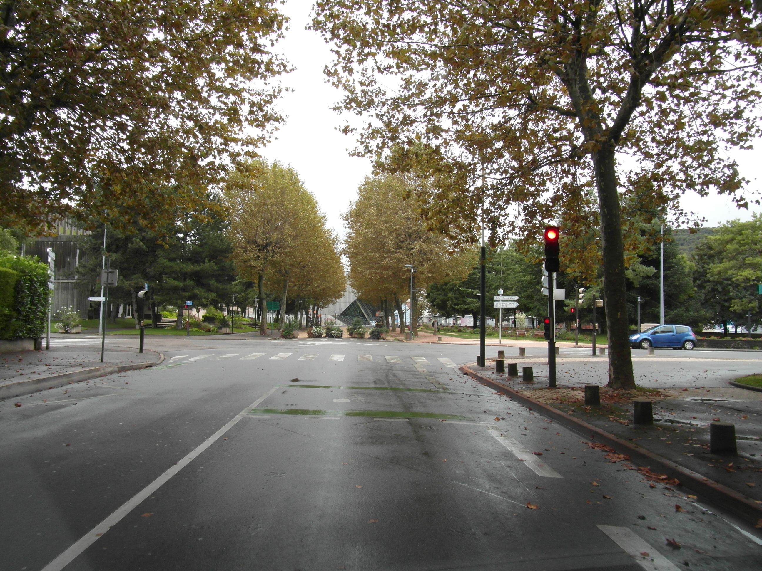 Mail Marcel Cachin